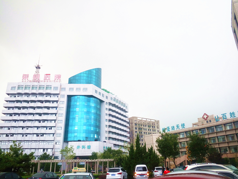 莱芜市钢城区莱钢医院